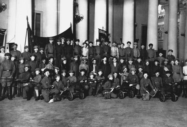 Protección del Palacio Tauride durante el Segundo Congreso Regional de los Soviets (Petrogrado, 1918). En la fila del medio (de izquierda a derecha): 9 º - MM Lashevich, th 10 - Yakov Sverdlov, 11 - León Trotsky, el 12 - Zinoviev GE